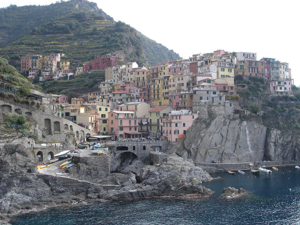 Manarola, Liguria, Italy.